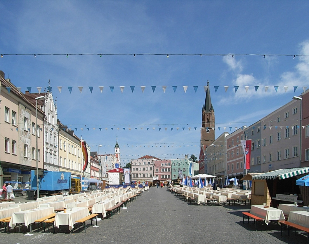 Der Stadtplatz von Eggenfelden einen Tag nach dem Stadtfest